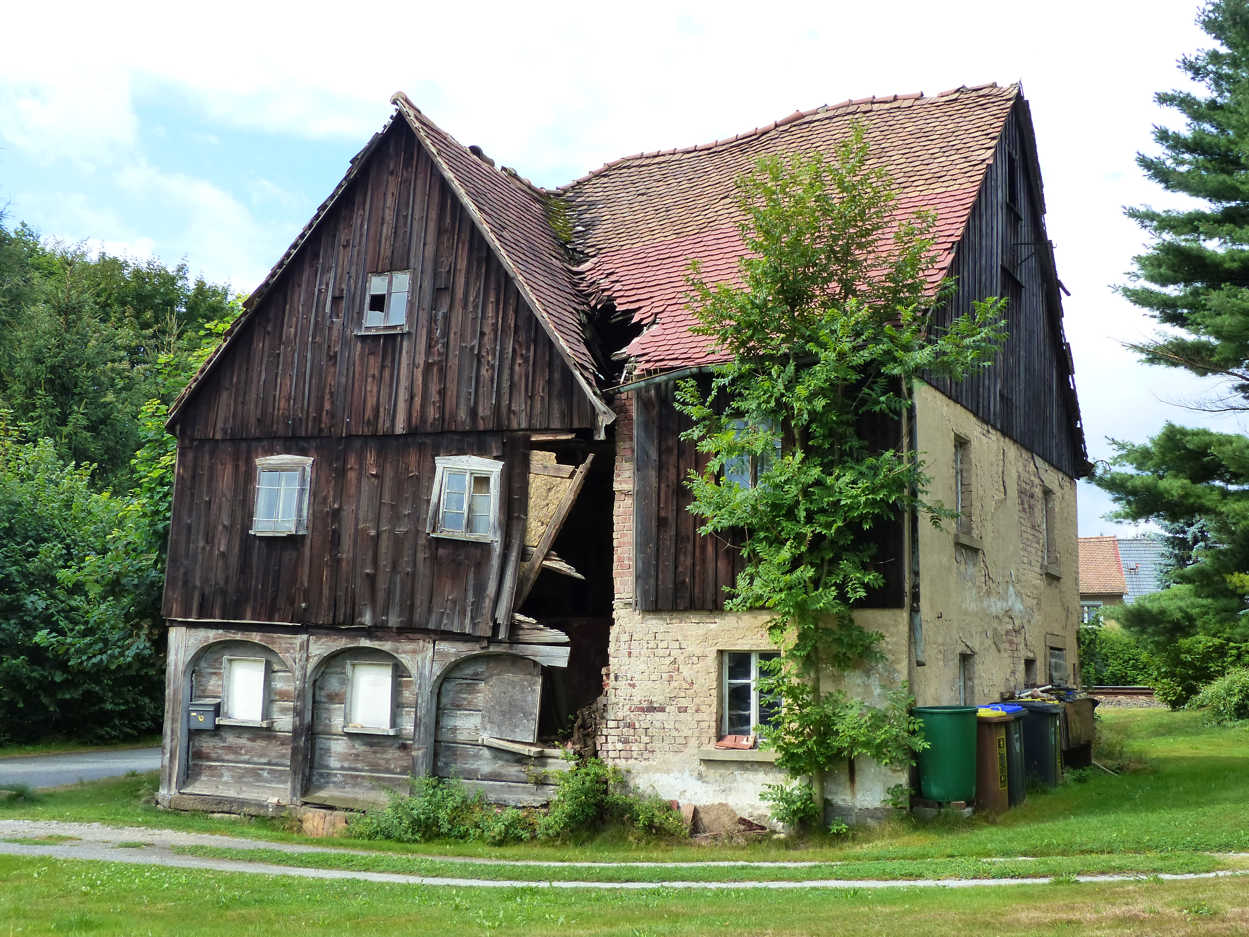 Umgebindehaus, Petersbach 2, Schirgiswalde, Schirgiswalde-Kirschau